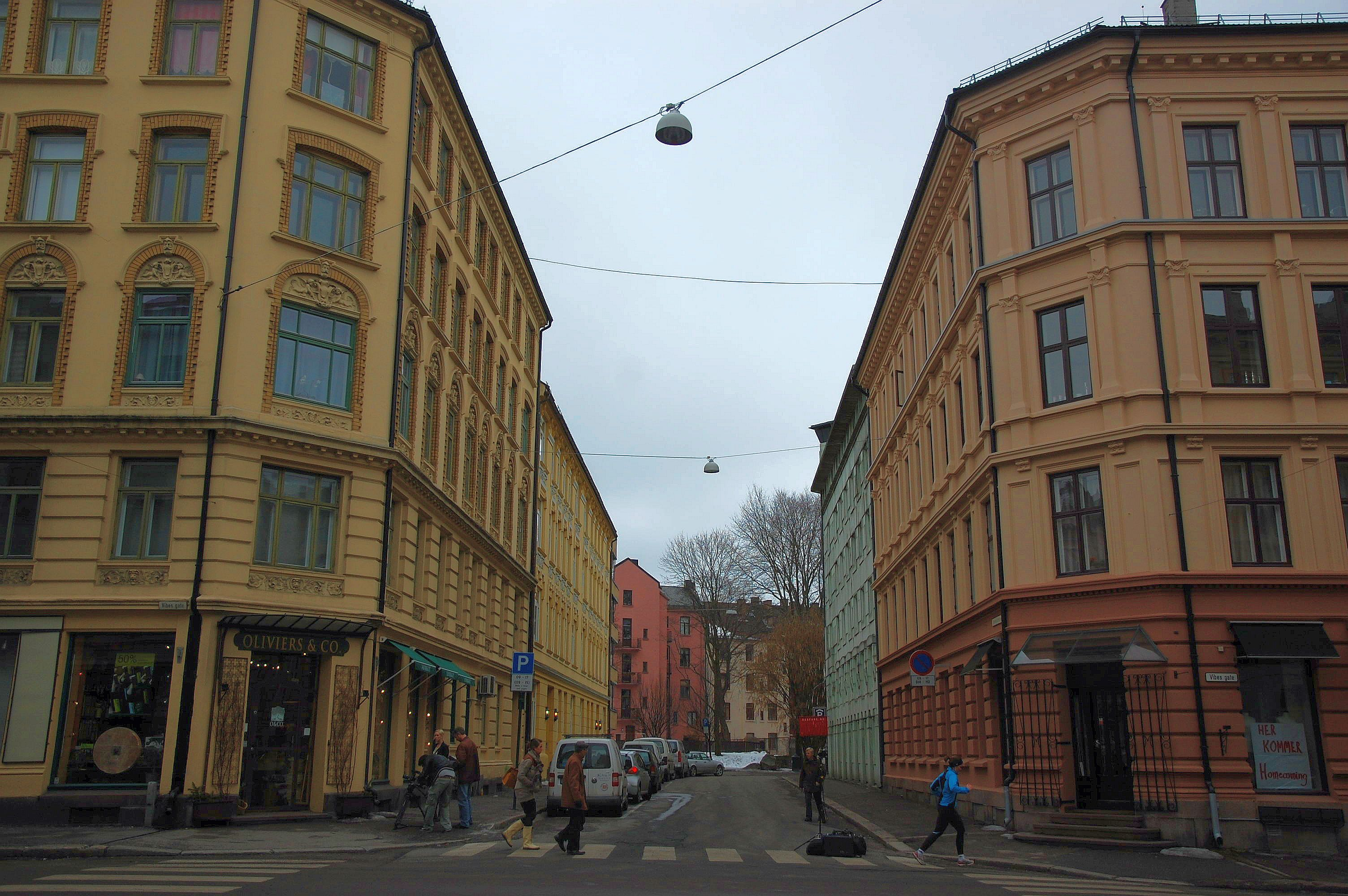 Dronning Astrids gate på Majorstuen i Oslo